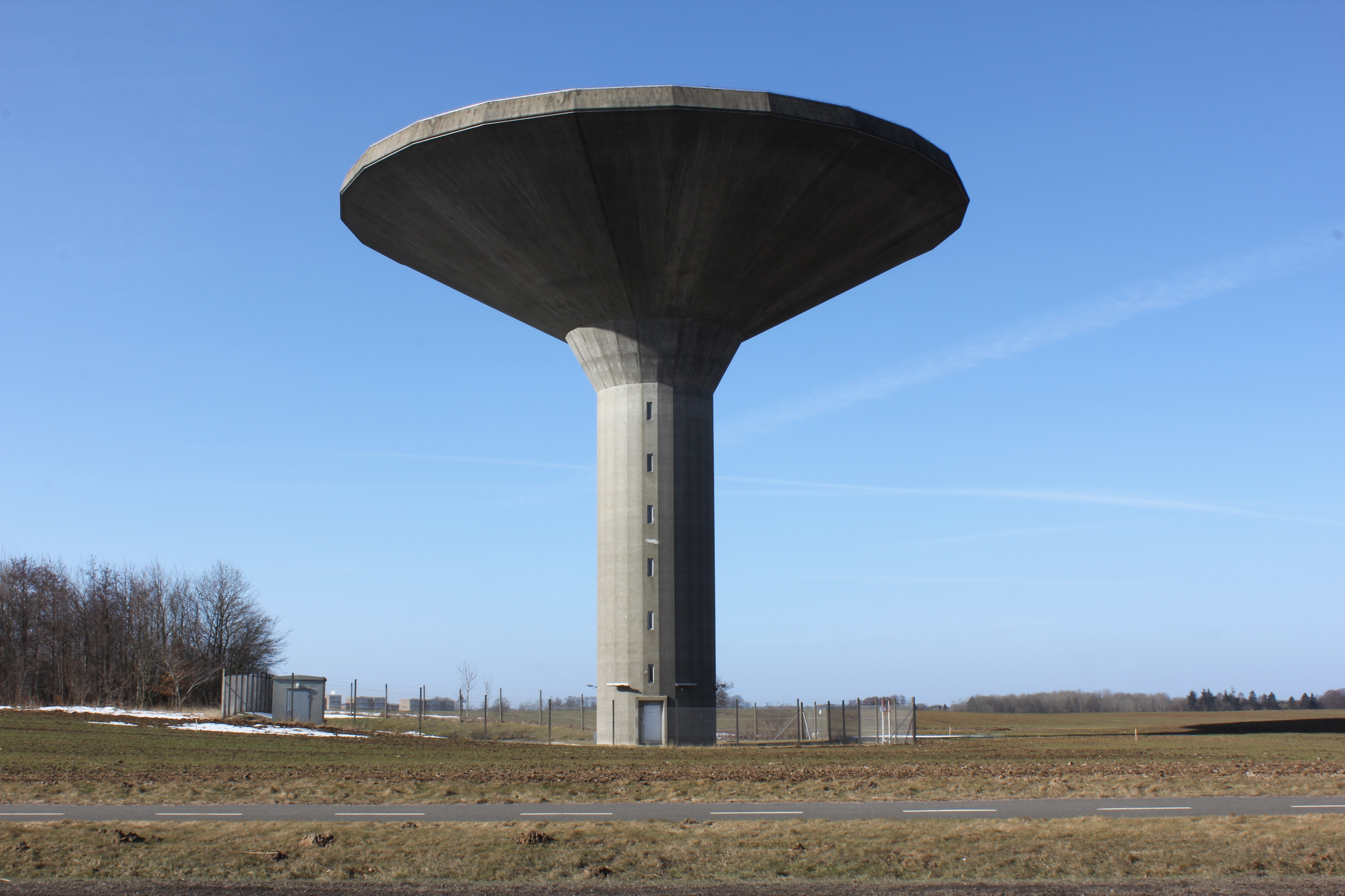 Søndermarkens Vandtårn ved Vejle - 2011